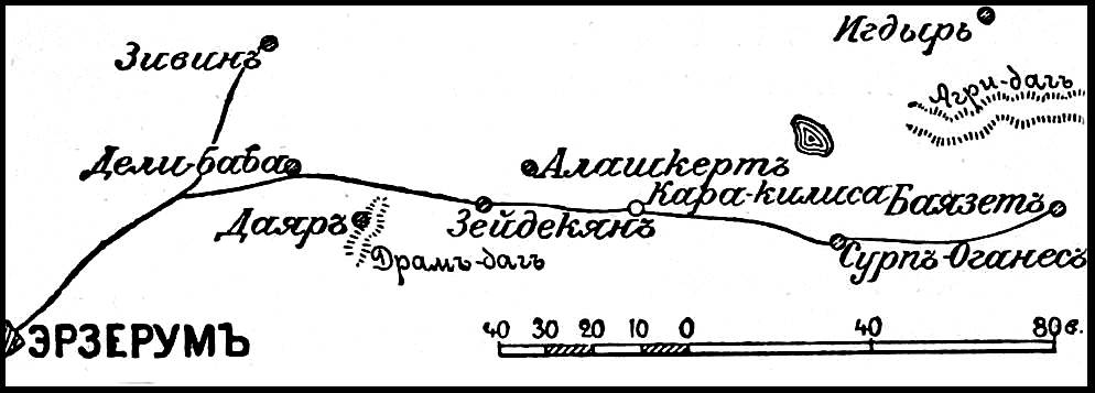 Это изображение было использовано для иллюстрирования статьи «Зейдекян» опубликованной в десятом томе «Военной энциклопедии», который был издан книгоиздательским товариществом И. Д. Сытина в 1912—1913 гг. в столице Российской империи городе Санкт-Петербурге.